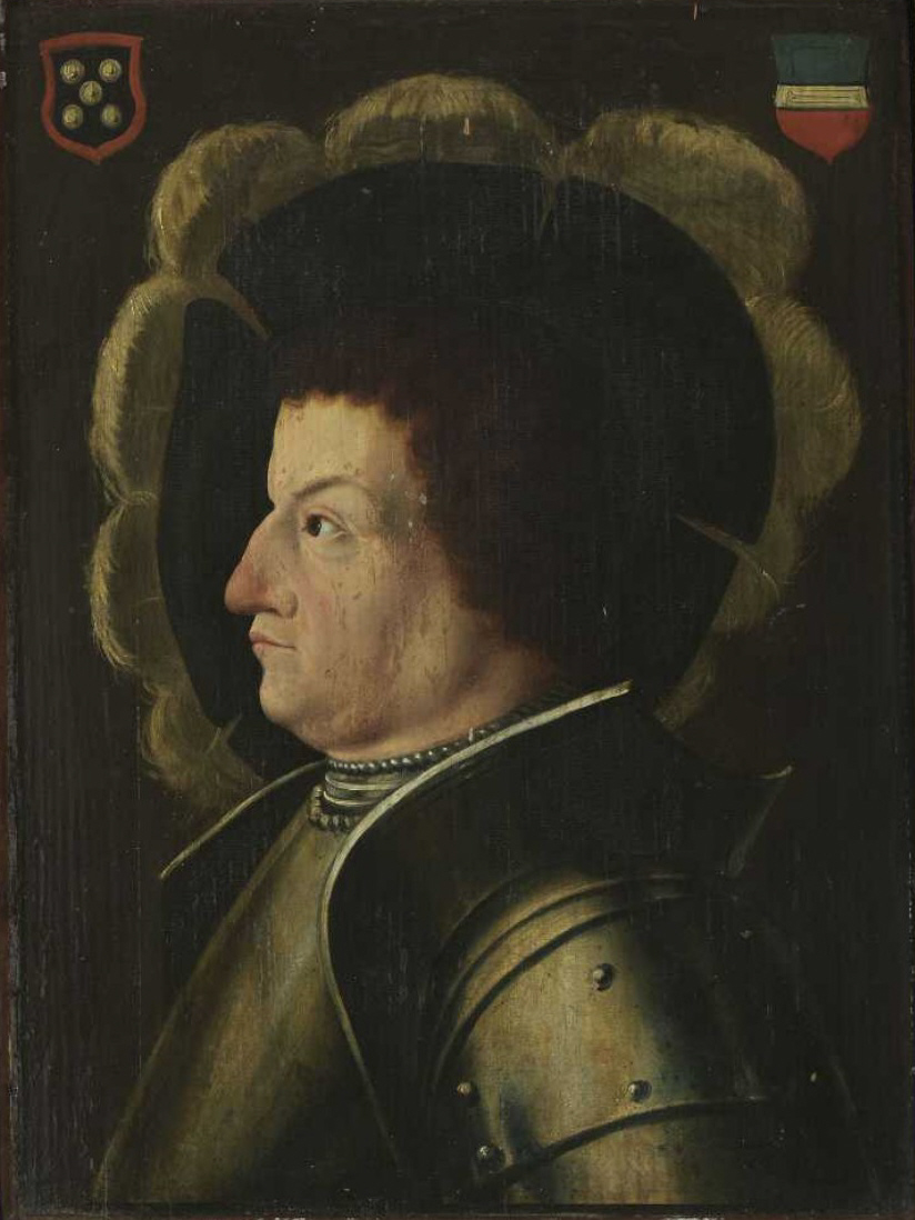 Franz von Sickingen im Harnisch und mit federgeschmücktem Barett. Öl auf Holz. 57 x 42,5 cm